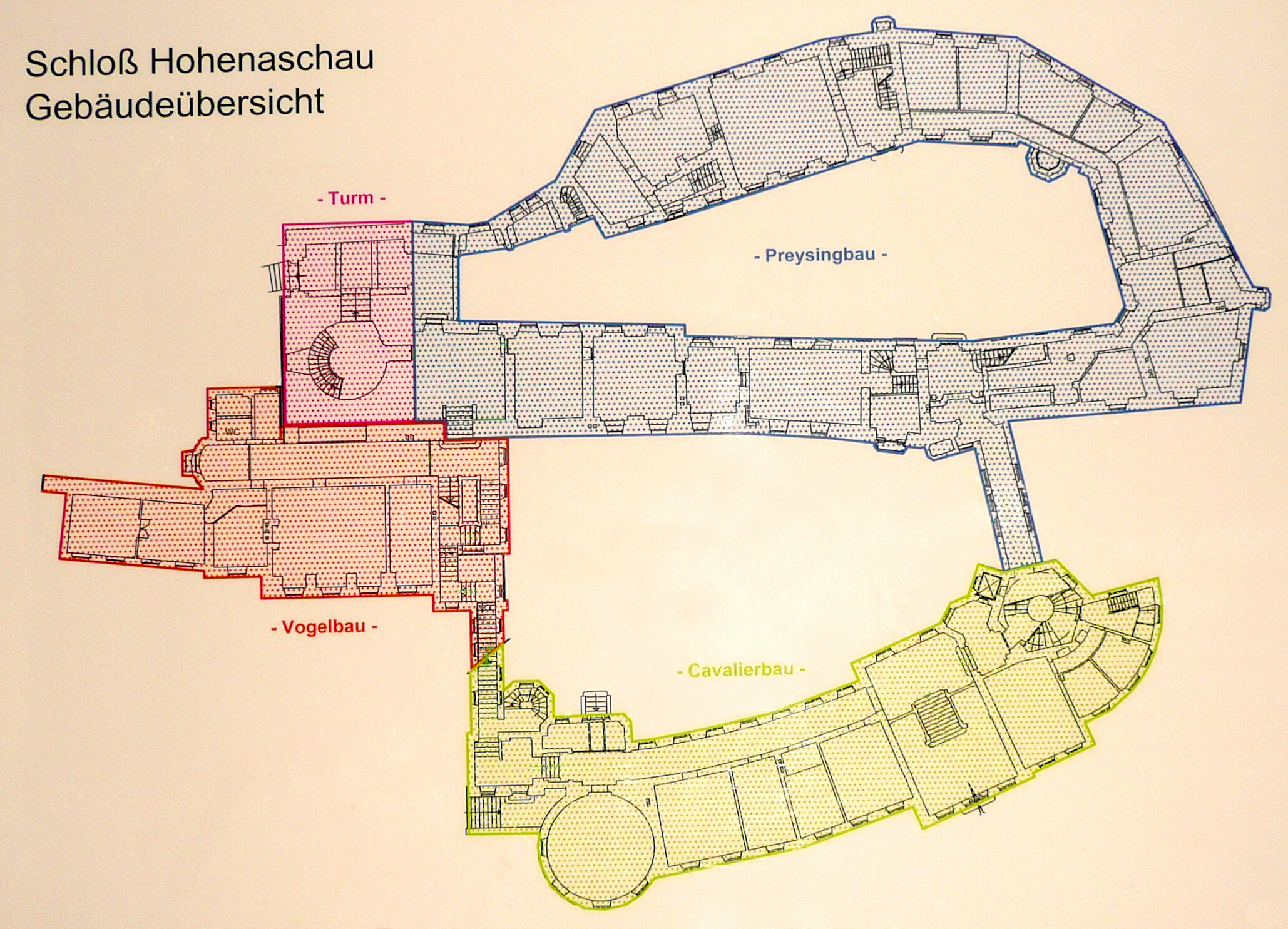 Grundriss des Schlosses Hohenaschau nach einem Fluchtwegplan des Erhohlungsheimes. Die Darstellung zeigt nur jeweils das Erdgeschoss der jeweiligen Gebäudeteile ohne die z. T. erheblichen Höhenunterschiede in der Lage dieser Gebäudeteile (z. B. Cavalierbau liegt etwa 10 m unterhalb des Preysingbaus) darzustellen. Auf dem Grundriss fehlen die Vorburg, die Kapelle und das Prientalmuseum im ehem. Mesnerhaus, die sich auf dem Plan links anschließen würden. Der Plan wurde Retouchiert (Reflexe und Markierungen von Brandmeldern und Fluchtwegen entfernt) sowie in Helligkeit und Kontrast verstärkt.